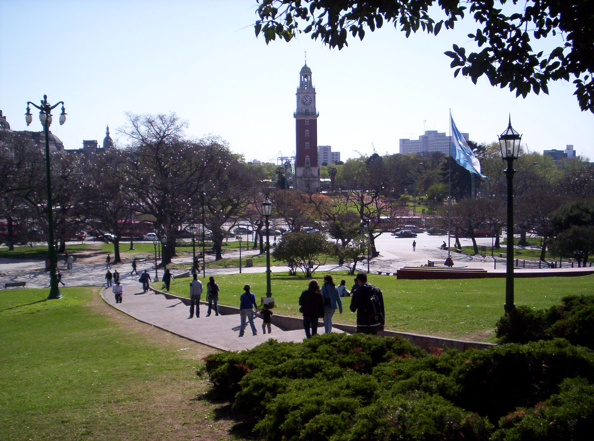 Vista de la Torre Monumental desde la Plaza San Martín, en Buenos Aires, Argentina